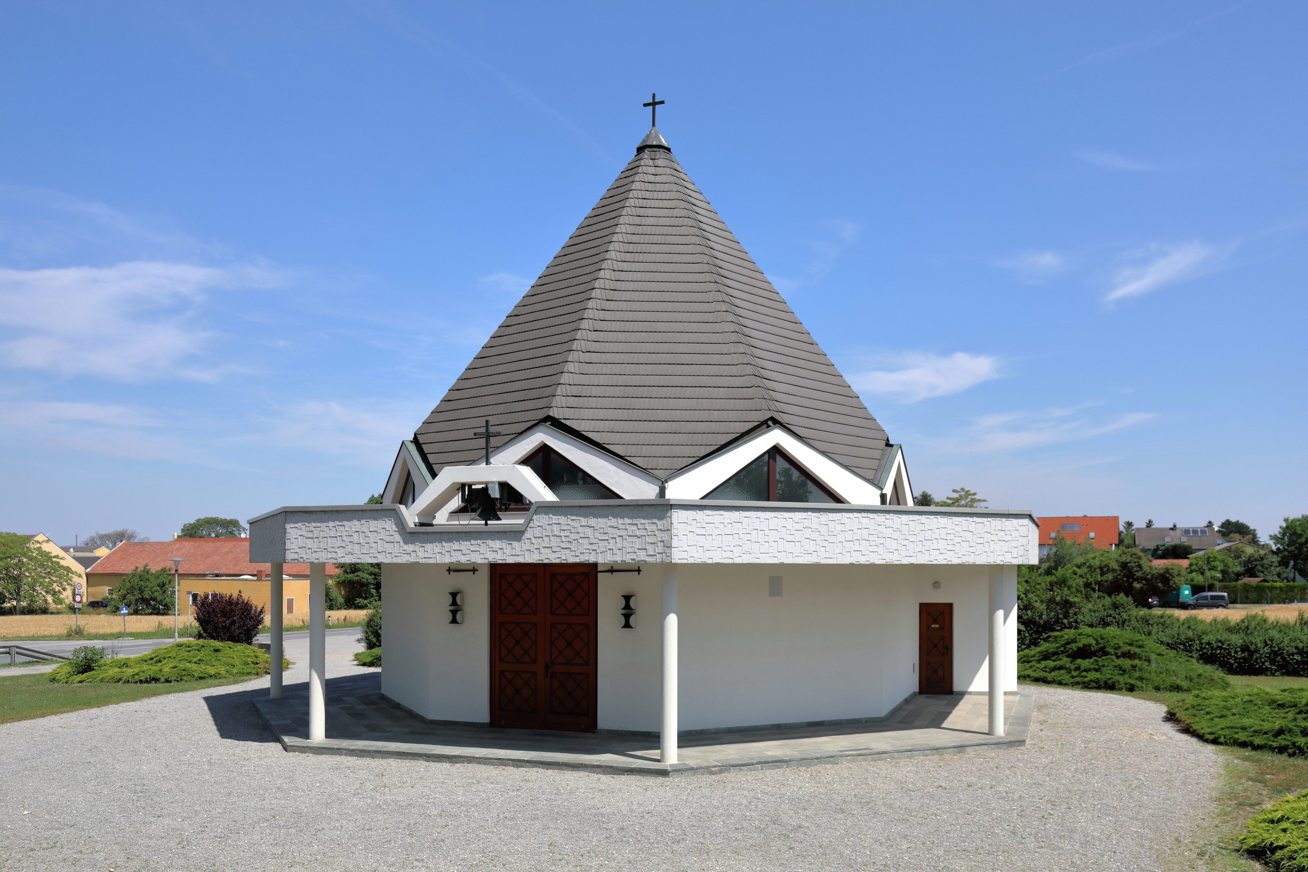 Südansicht der Antoniuskapelle in Pellendorf, ein Ortsteil der niederösterreichischen Marktgemeinde Himberg.Die Antoniuskapelle, am südlichen Ortsausgang von Pellendorf, wurde in der Mitte der 1980er-Jahre als Aufbahrungshalle nach Plänen des Architekten Anton Seemann errichtet. Die feierliche Einweihung am Pfingstmontag, den 19. Mai 1986, nahm Weihbischof Florian Kuntner vor.